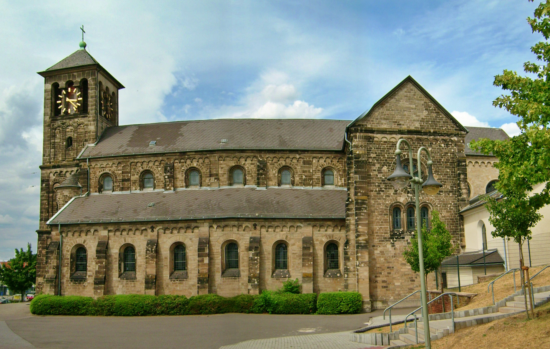 Kirche in Ensdorf Saar